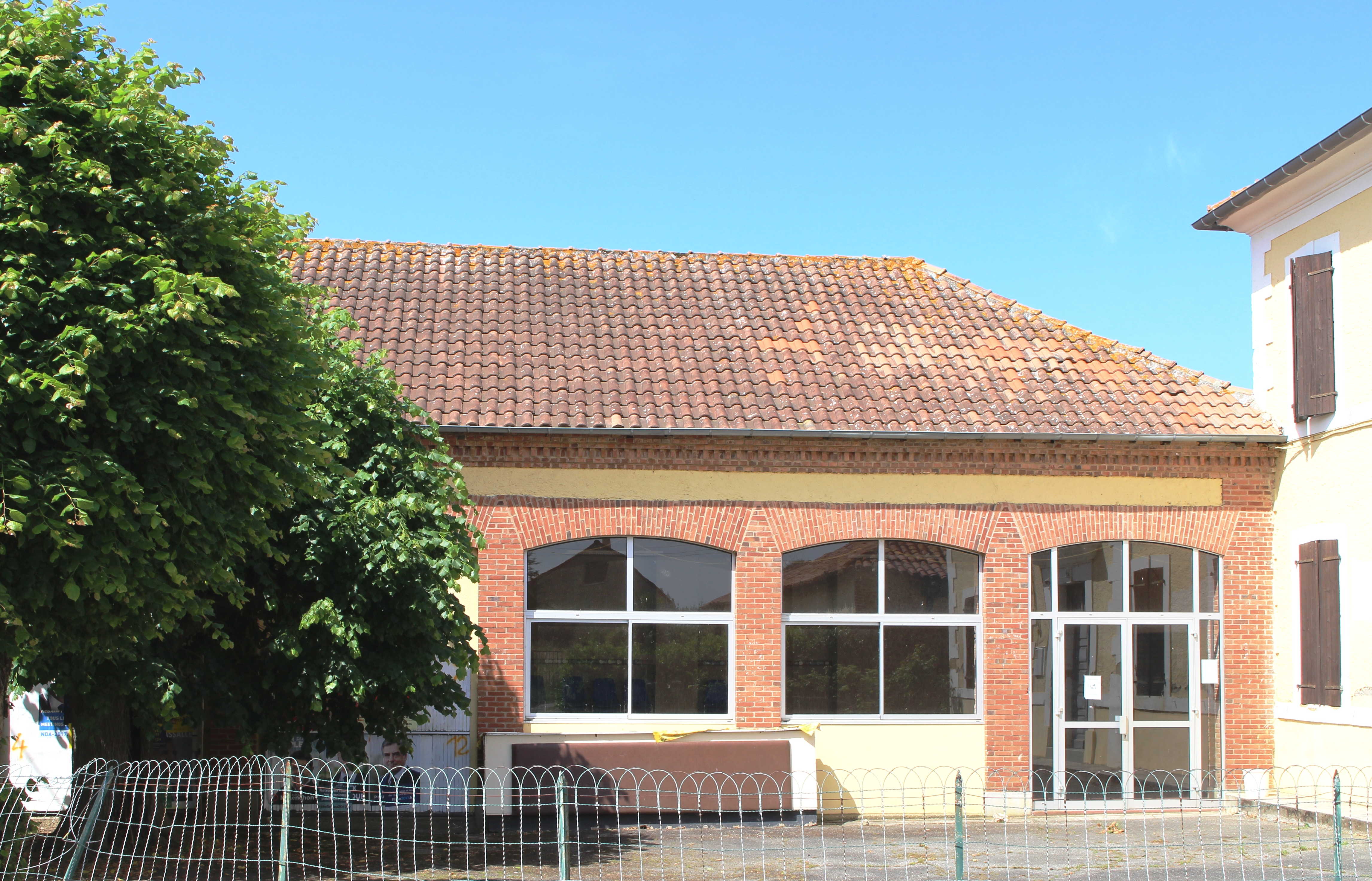 Salle des fêtes de Bouilh-Péreuilh (Hautes-Pyrénées)